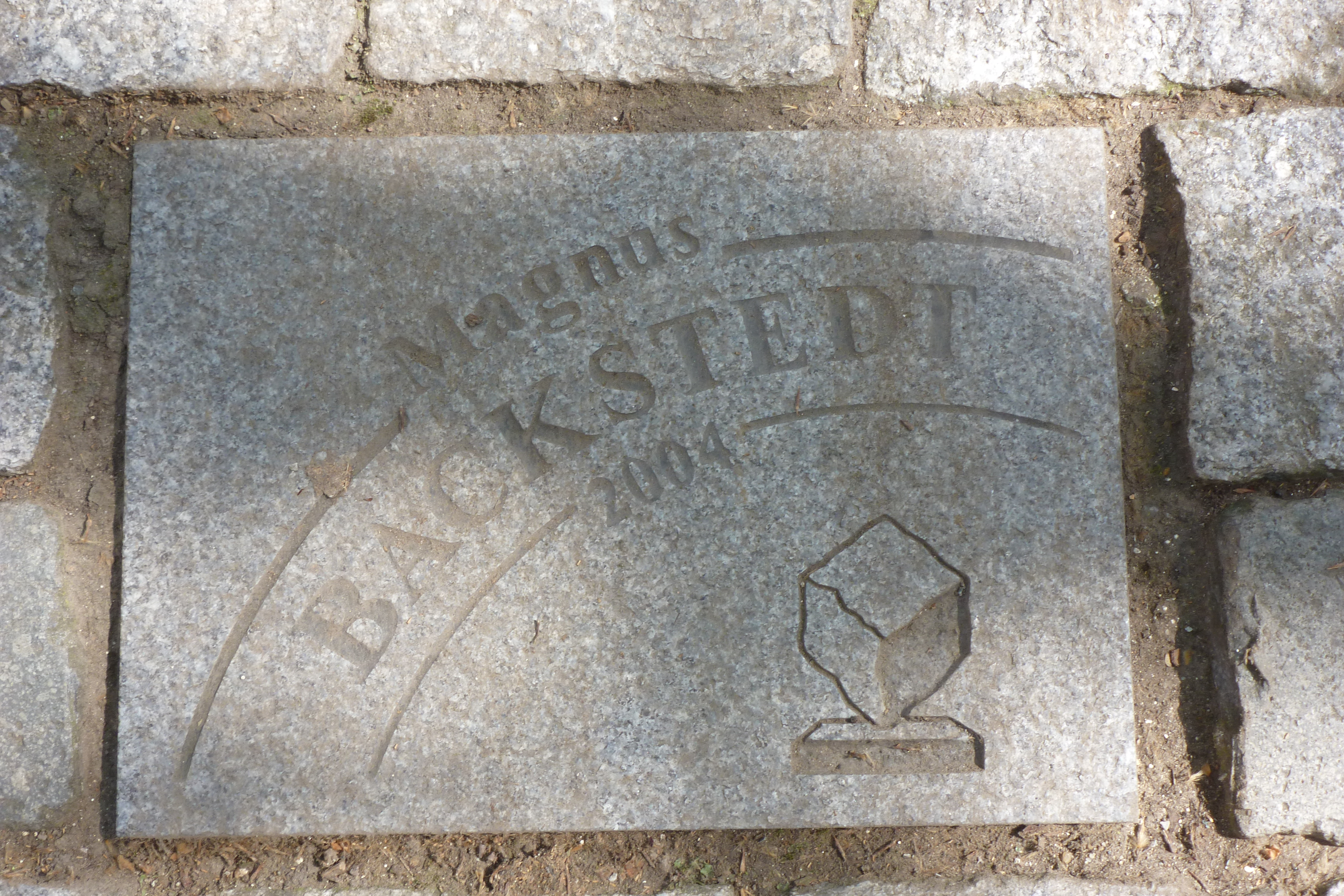 Pflasterstein für Magnus Bäckstedt auf der Allée Charles Crupelandt in Roubaix